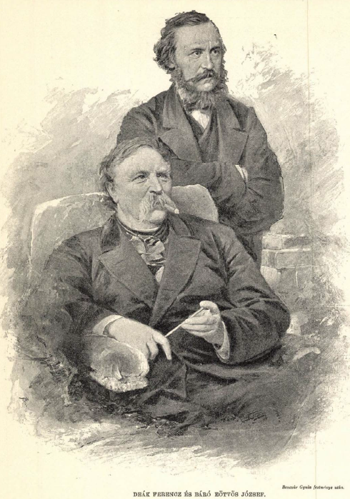 Deák Ferenc (1803–1876), Magyarország igazságügy-minisztere, és Báró Eötvös József (1813–1871), a Batthyány-kormány, majd az Andrássy-kormány vallás- és közoktatásügyi minisztere